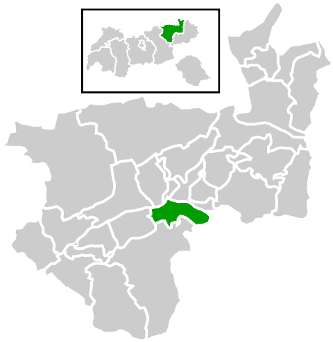 Lage der Gemeinde innerhalb des Bezirks Kufstein